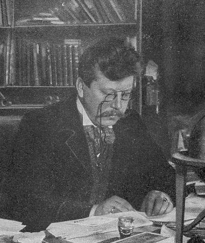 Albrecht Dieterich (1866–1908), deutscher Altphilologe und Religionswissenschaftler. Originalphotographie